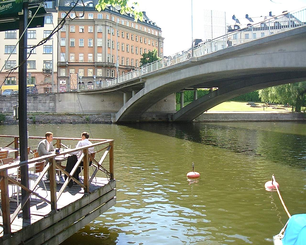 Kungsbron, Stockholm.